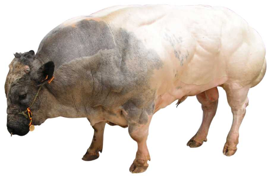 taureau de race blanc-bleu belge. Culard. Contents 1 Source 2 Licensing 3 Licensing 4 Original upload log Source Photo détourée de Roby ✉ prise au marché annuel de Jette (Bruxelles) le 30 août 2004. Licensing Photo et montage GFDL Grand format sur demande à Roby ✉